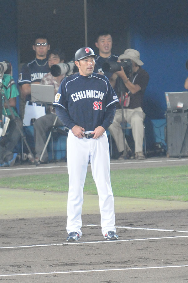 中日ドラゴンズ、上田佳範コーチ。こまちスタジアムで。